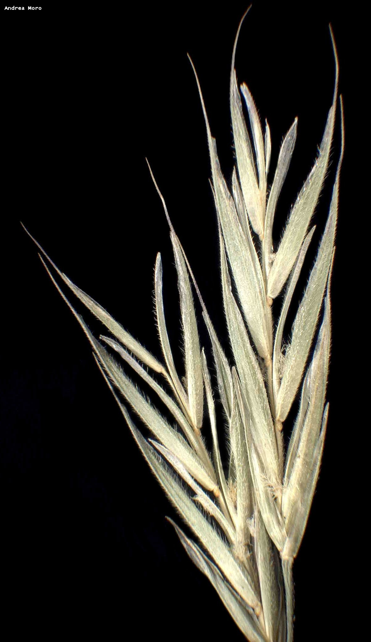 Bromopsis erecta fruits